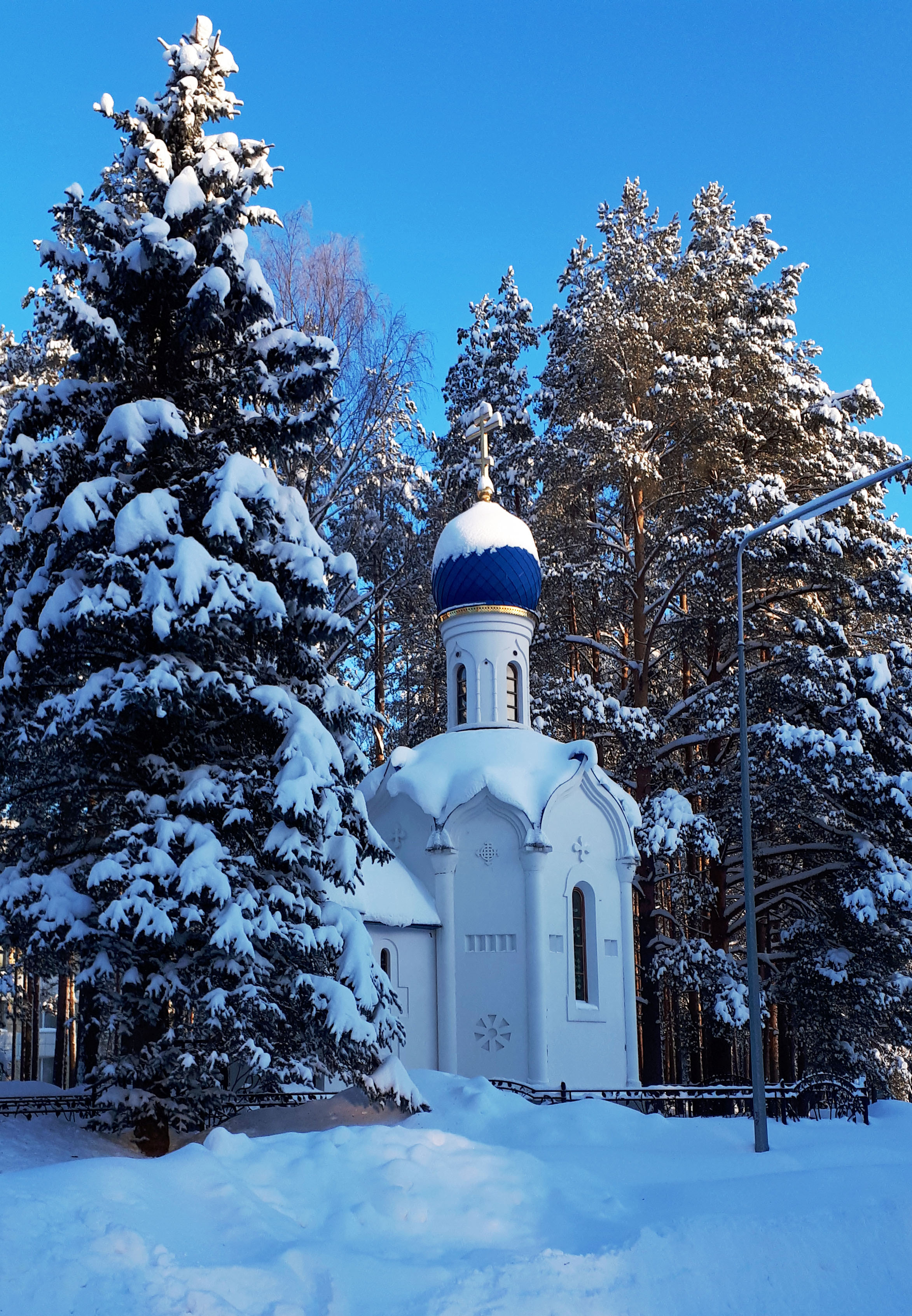 Часовня иконы Божией Матери «Всецарица», расположена на территории Российского научного центра радиологии и хирургических технологий им. академика А. М. Гранова. Архитектор Фёдор Афуксениди. Россия, Санкт-Петербург, пос. Песочный, Ленинградская ул, 70